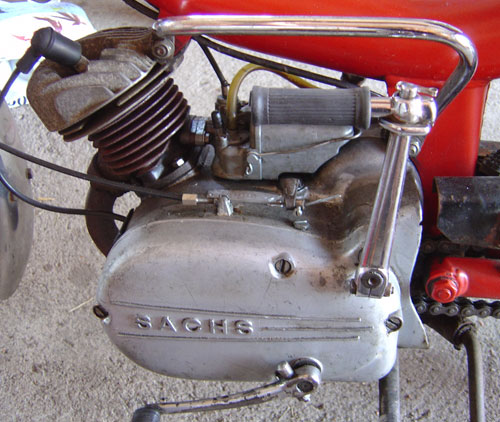 Engine, made by Fichtel & Sachs (ZF Sachs), Schweinfurt, Germany